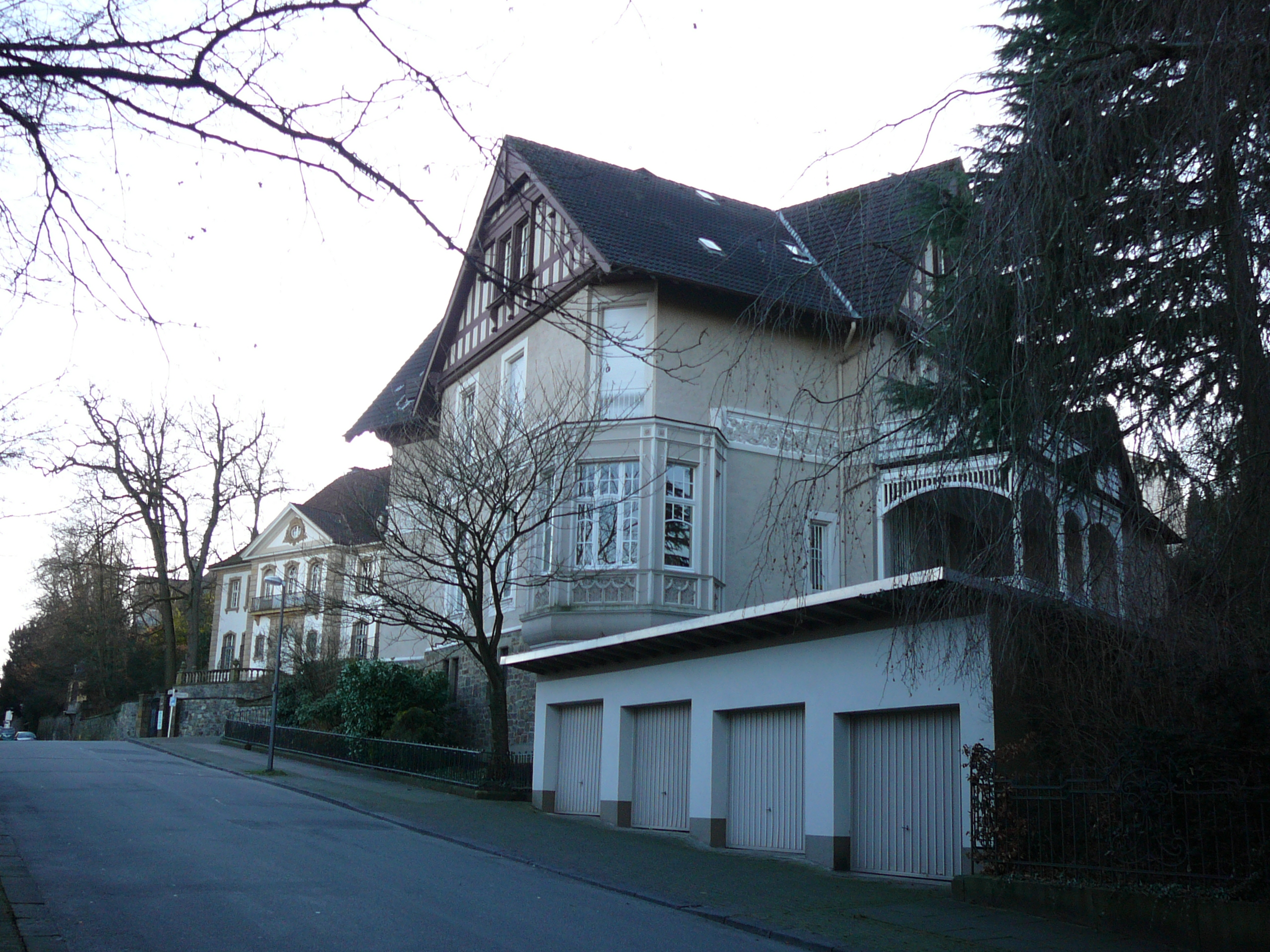 Villa im Briller Viertel, Moltkestr, Wuppertal